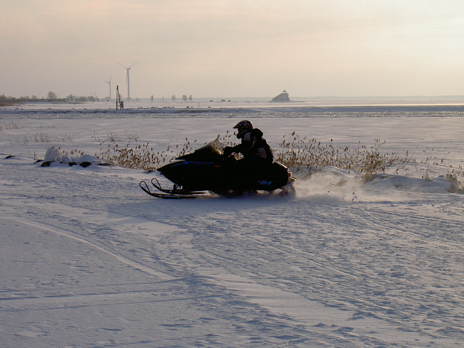 Oulu tengerpartja telen, hatterben a Nallikari Sajat digitalis kamera. --Math 2005. augusztus 11., 11:21 (CEST) hivatkozando forras: Brendel Matyas